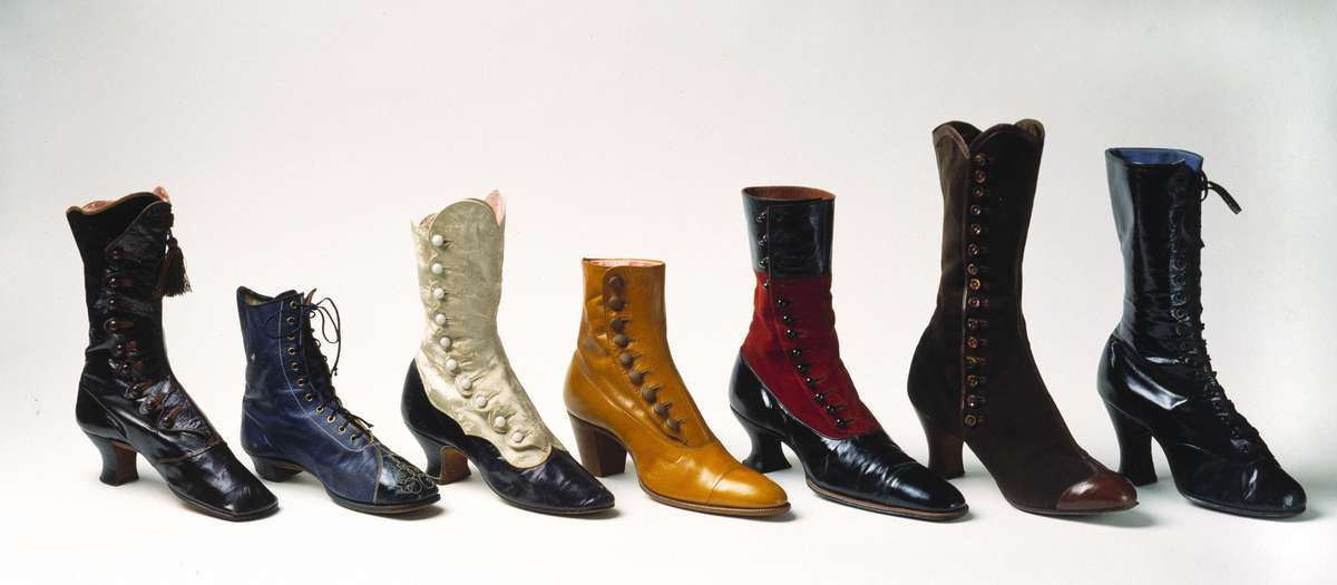 Damkängor från 1870- till 1920-talet.